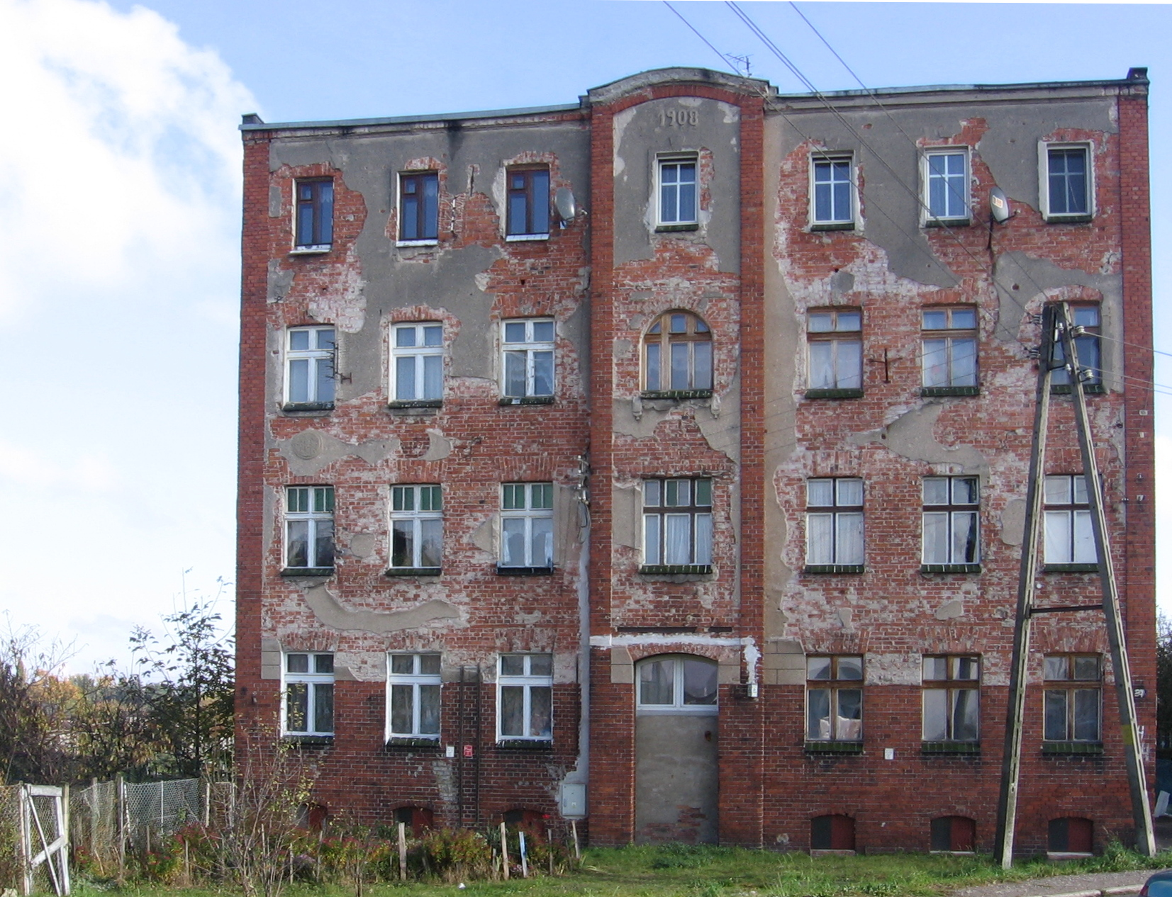 osiedle Księże Wielkie we Wrocławiu